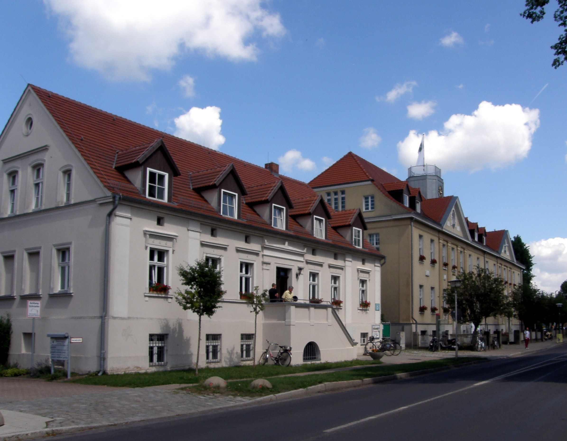 Falkensee, Falkenhagener Straße, Rathaus mit Haus D (Falkenhagener Straße 49); Baudenkmale